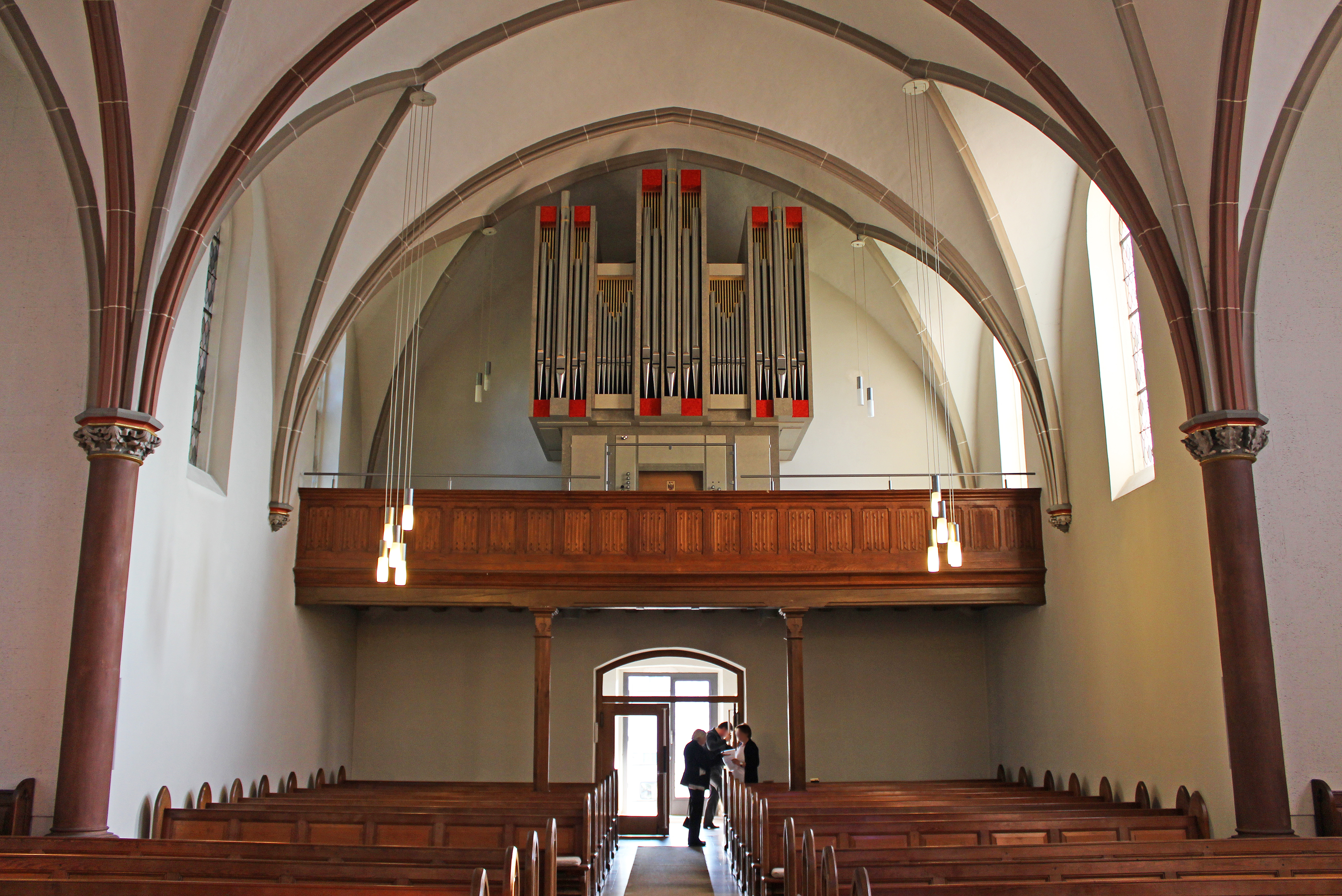 Blick ins Innere der evangelischen Kirche in Riegelsberg, Regionalverband Saarbrücken, Saarland